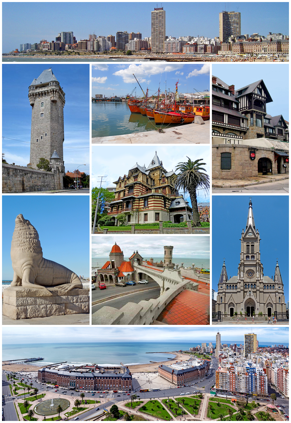 Mosaico fotográfico de Mar del Plata.